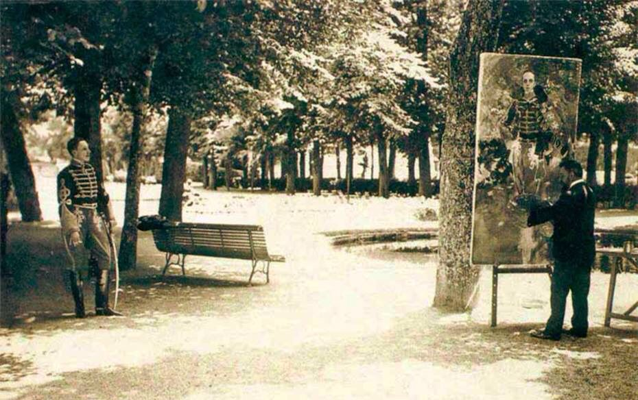 Campúa: Joaquín Sorolla pintando al Rey Alfonso XIII en La Granja